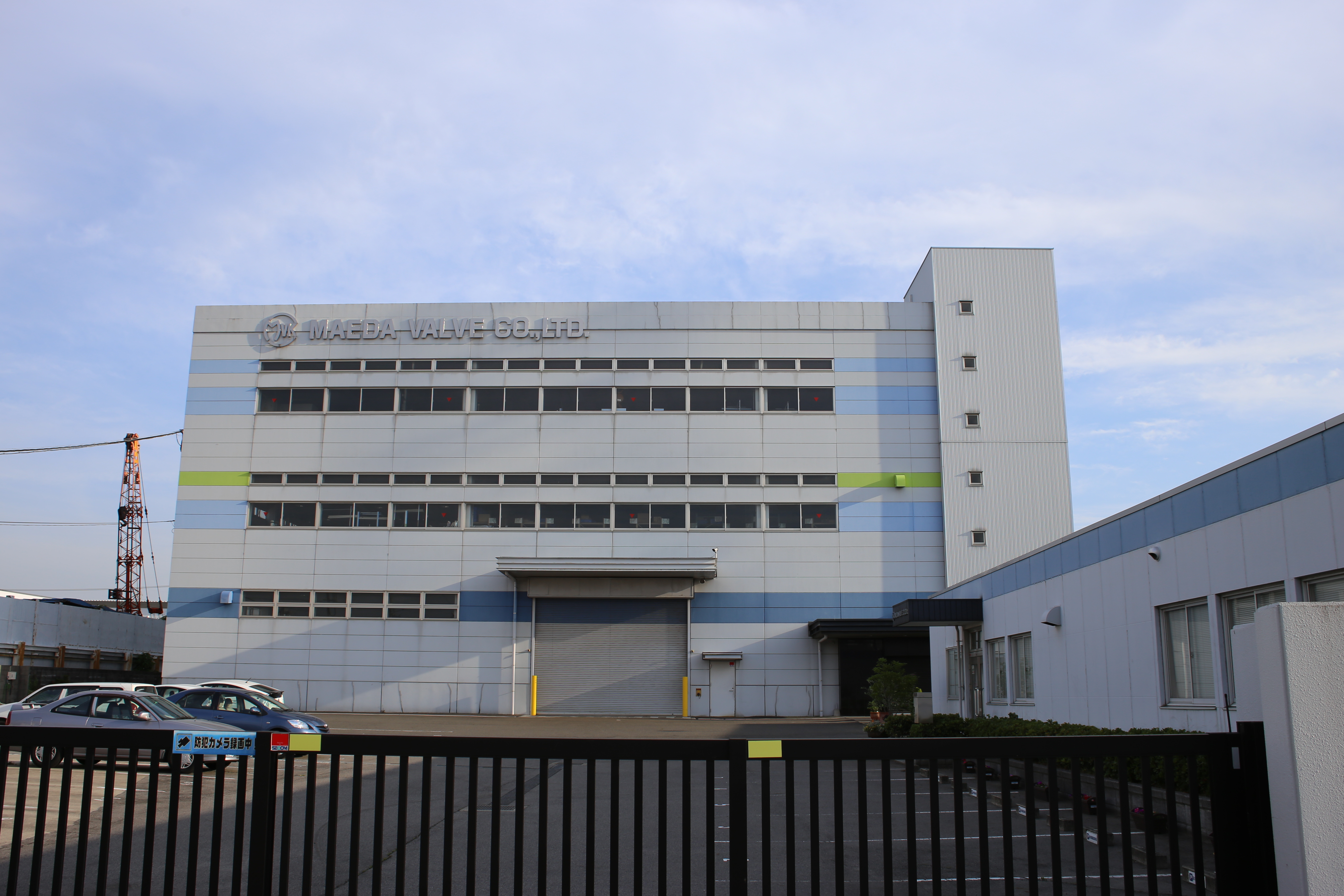 名古屋市港区船見町の前田バルブ工業本社を北側公道より撮影